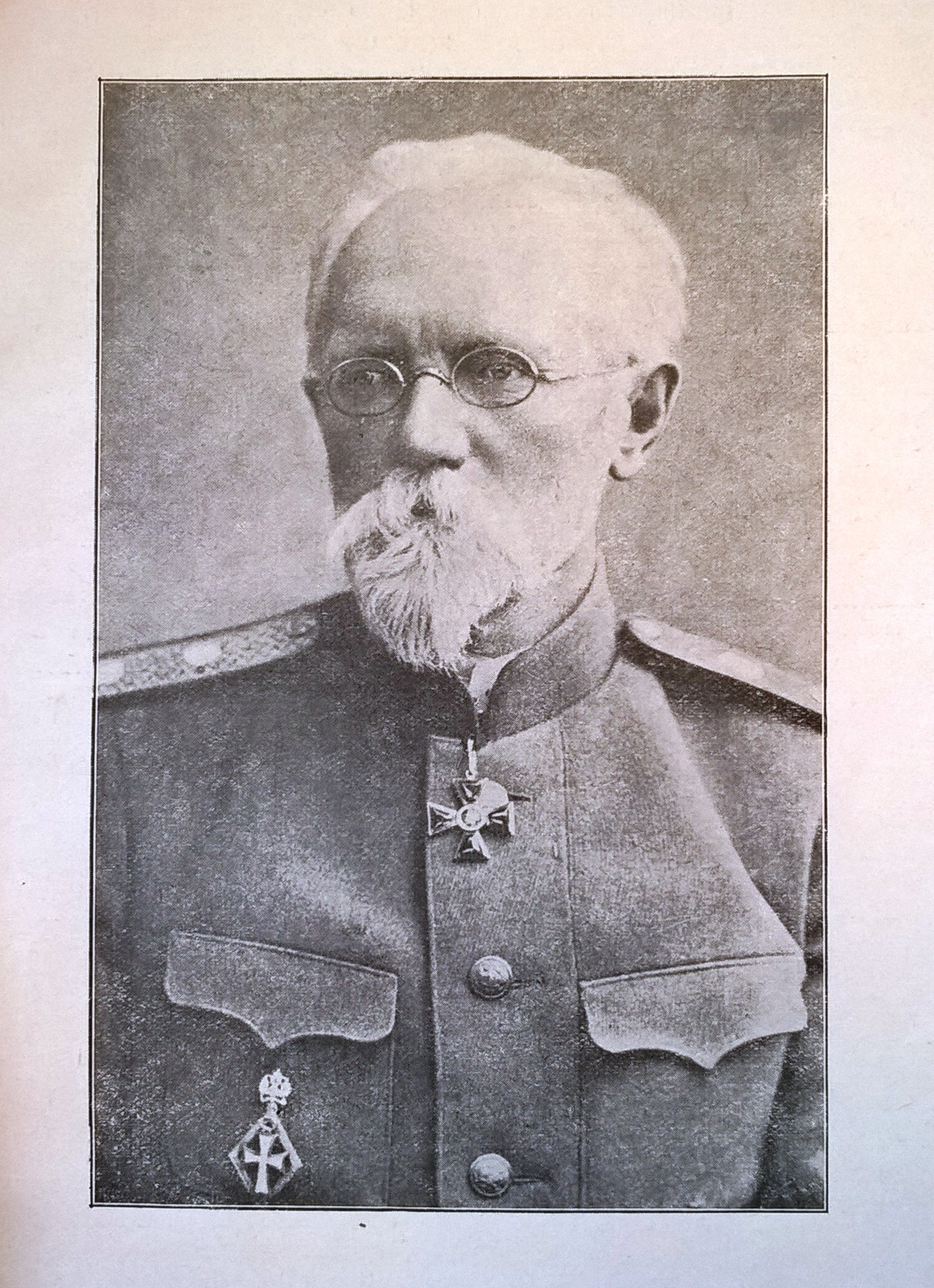 Portrait d'Evguéni Schmurlo